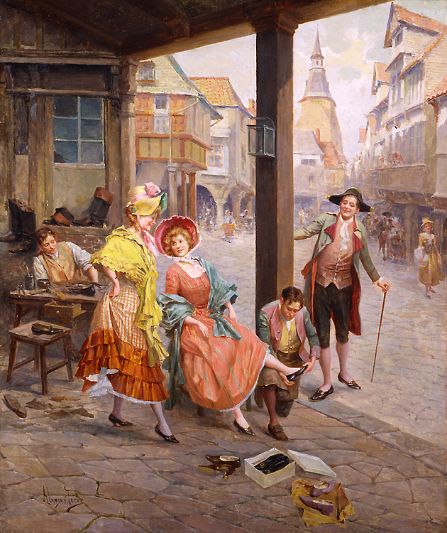 Alonso-Perez (1881 - 1914). L'Surent d'un Marchand de Chausseures